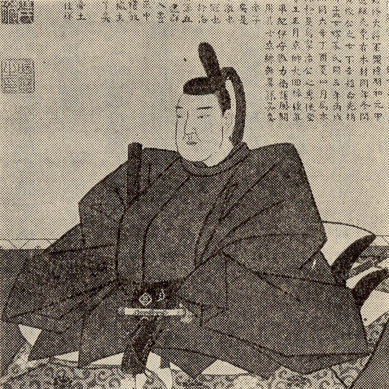 久留島通祐の肖像(モノクロ)。